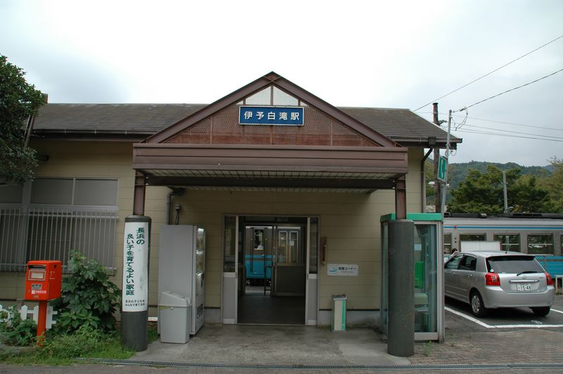 JR-Shikoku(JAPAN) Yosan-Line, Iyo-Shirataki Sta. photo by (2005.9.19)